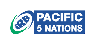 Logo des Pacific 5 Nations Cup